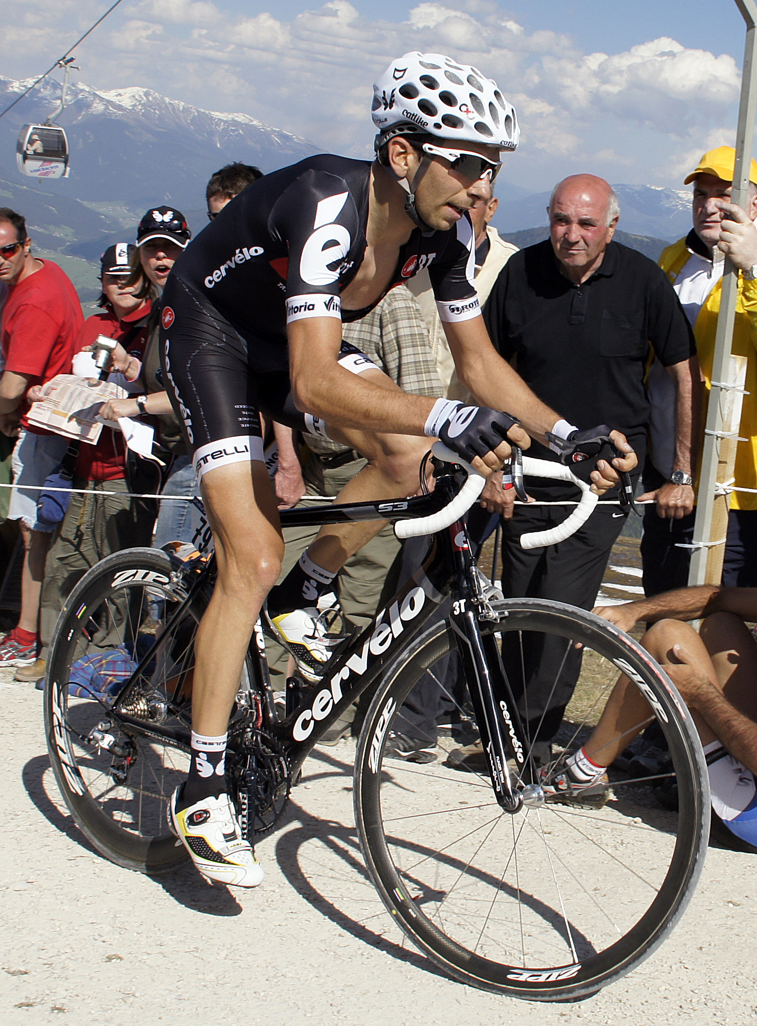 Xavier Tondó tijdens de beklimming van Kronplatz in de Giro d'Italia 2010